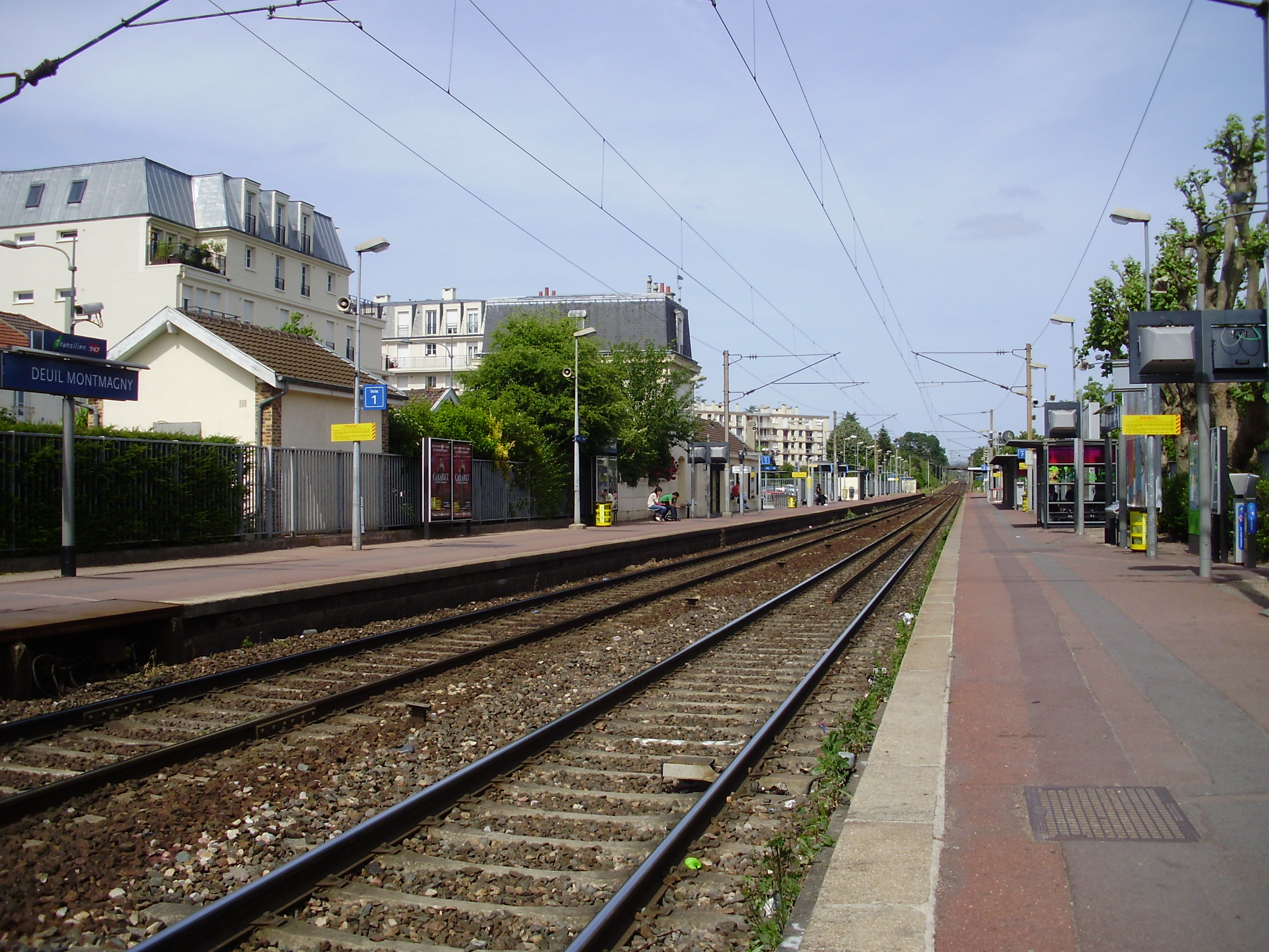 Gare de Deuil - Montmagny, à Deuil-la-Barre, Val-d'Oise, France : vue des quais et des voies en regardant vers la gare de Montsoult - Maffliers depuis l'extrémité sud-ouest du quai pour la gare de Paris-Nord